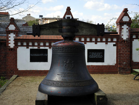 Kaiserin-Augusta-Glocke (gewidmet 1894) der Gnadenkirche auf dem Invalidenfriedhof in Berlin-Mitte